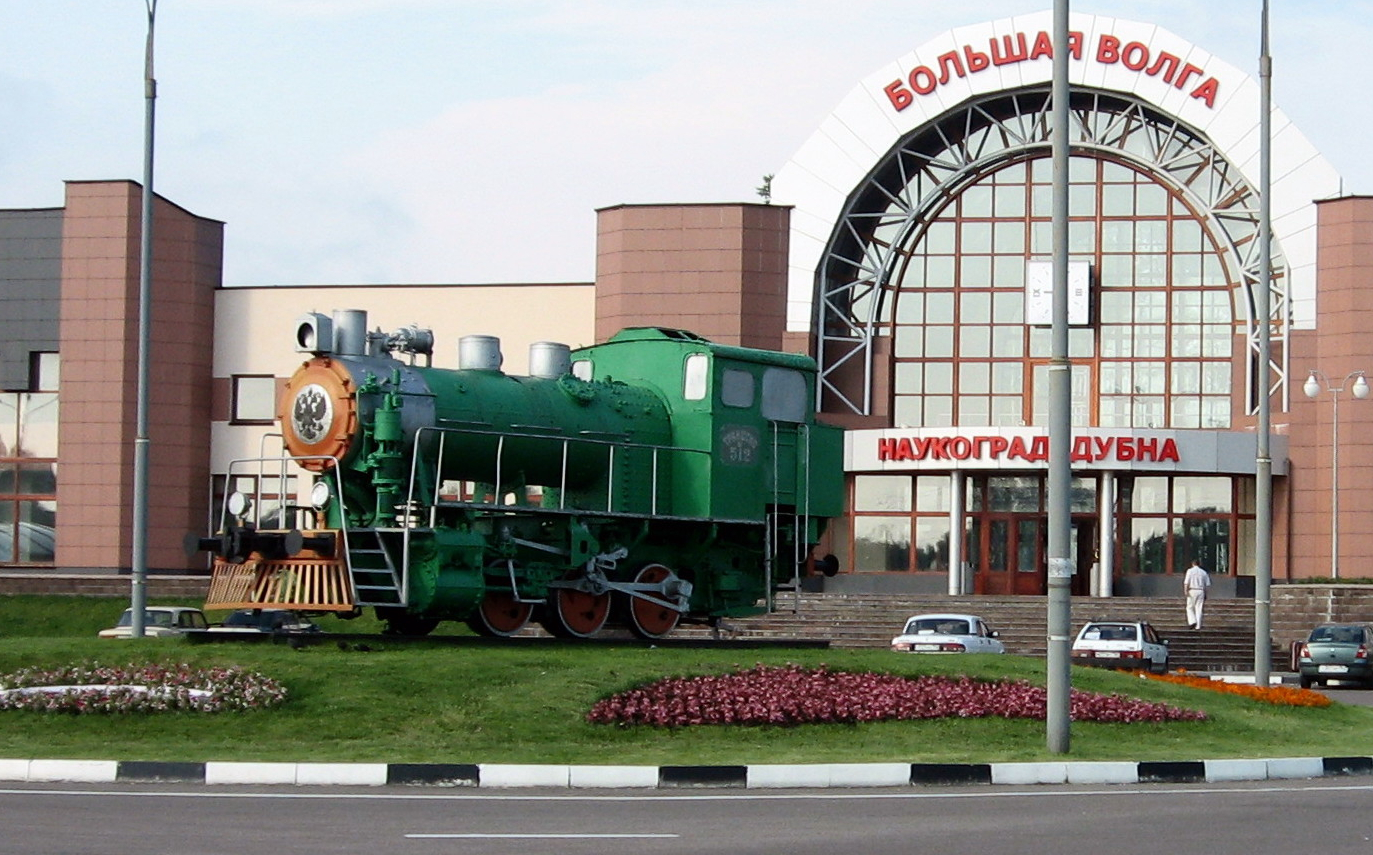 Паровоз перед зданием вокзала на Большой Волге